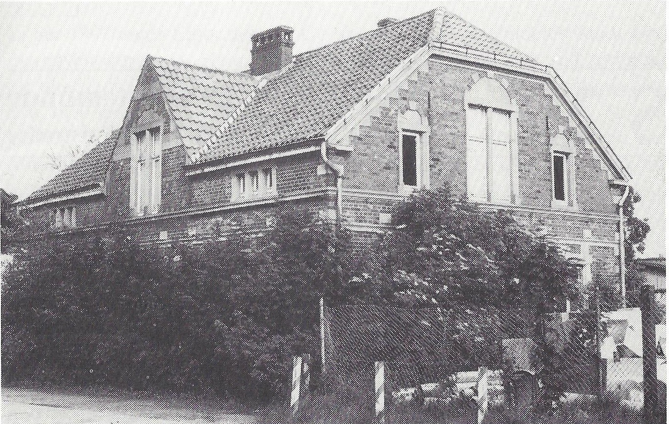 Das Postgebäude als letztes Relikt des Geestemünder Bahnhofs wurde inzwischen abgerissen.